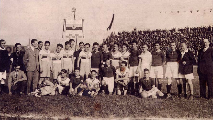 Inaugurazione dello Stadio Filadelfia. Foto dell'epoca. Le squadre di Torino e Fortitudo Roma.